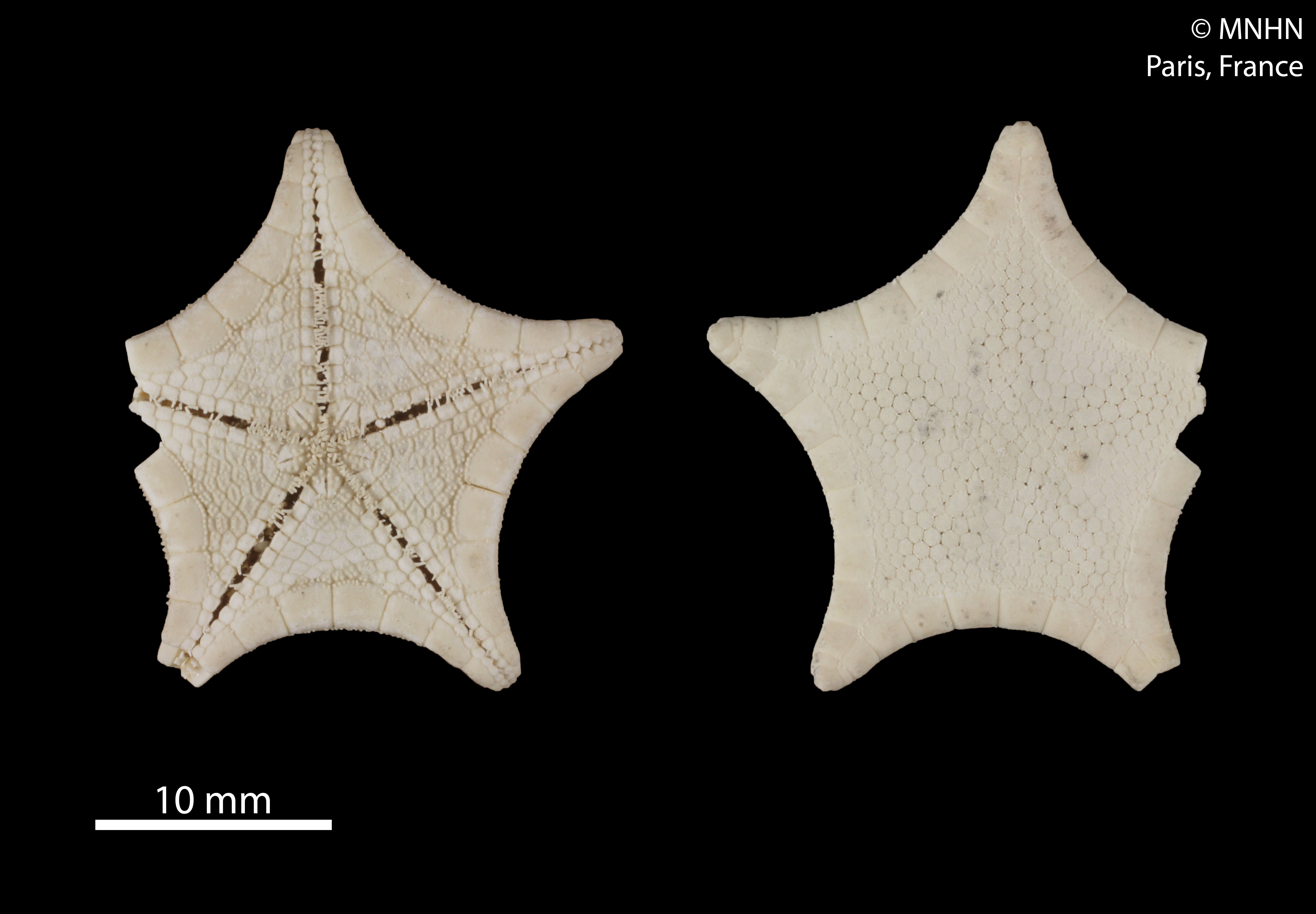 Plinthaster dentatus, collection du Muséum National d'Histoire Naturelle (Paris, France).